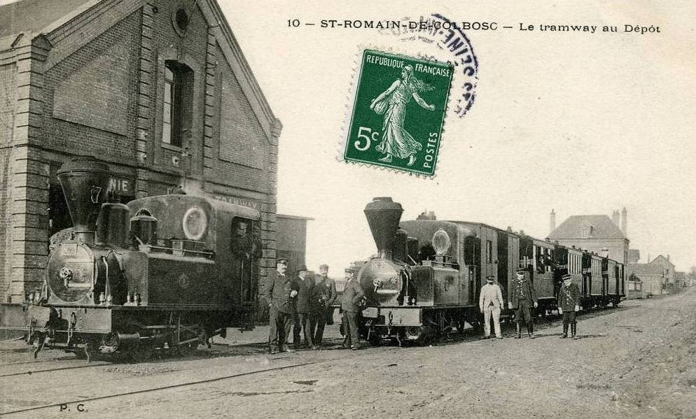 Locomotives Corpet Louvet (n°681 et n°682 - 1897), n° 2 et 3 du tramway de Saint Romain de Colbosc.